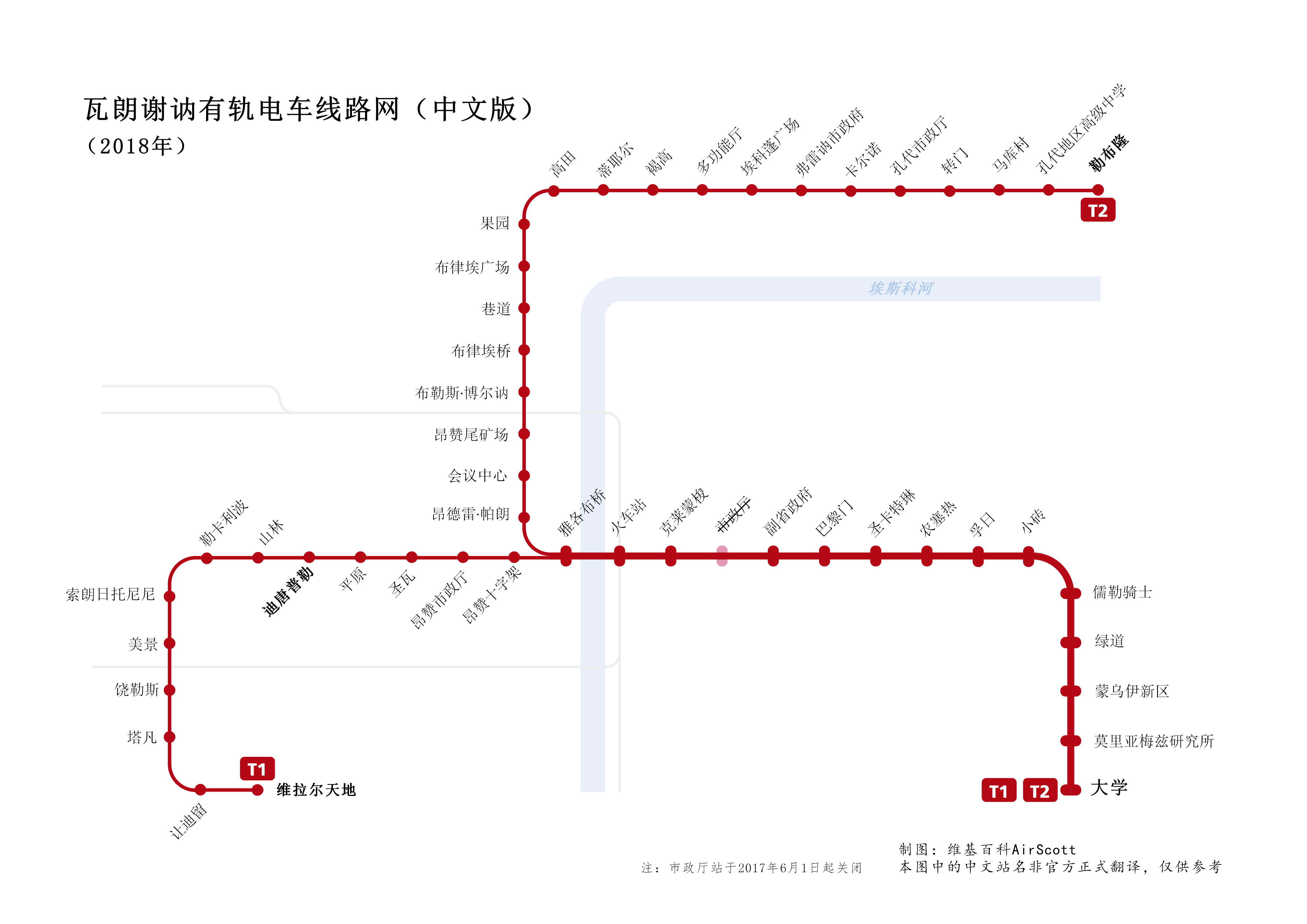 le réseau du tramway de Valenciennes en chinois